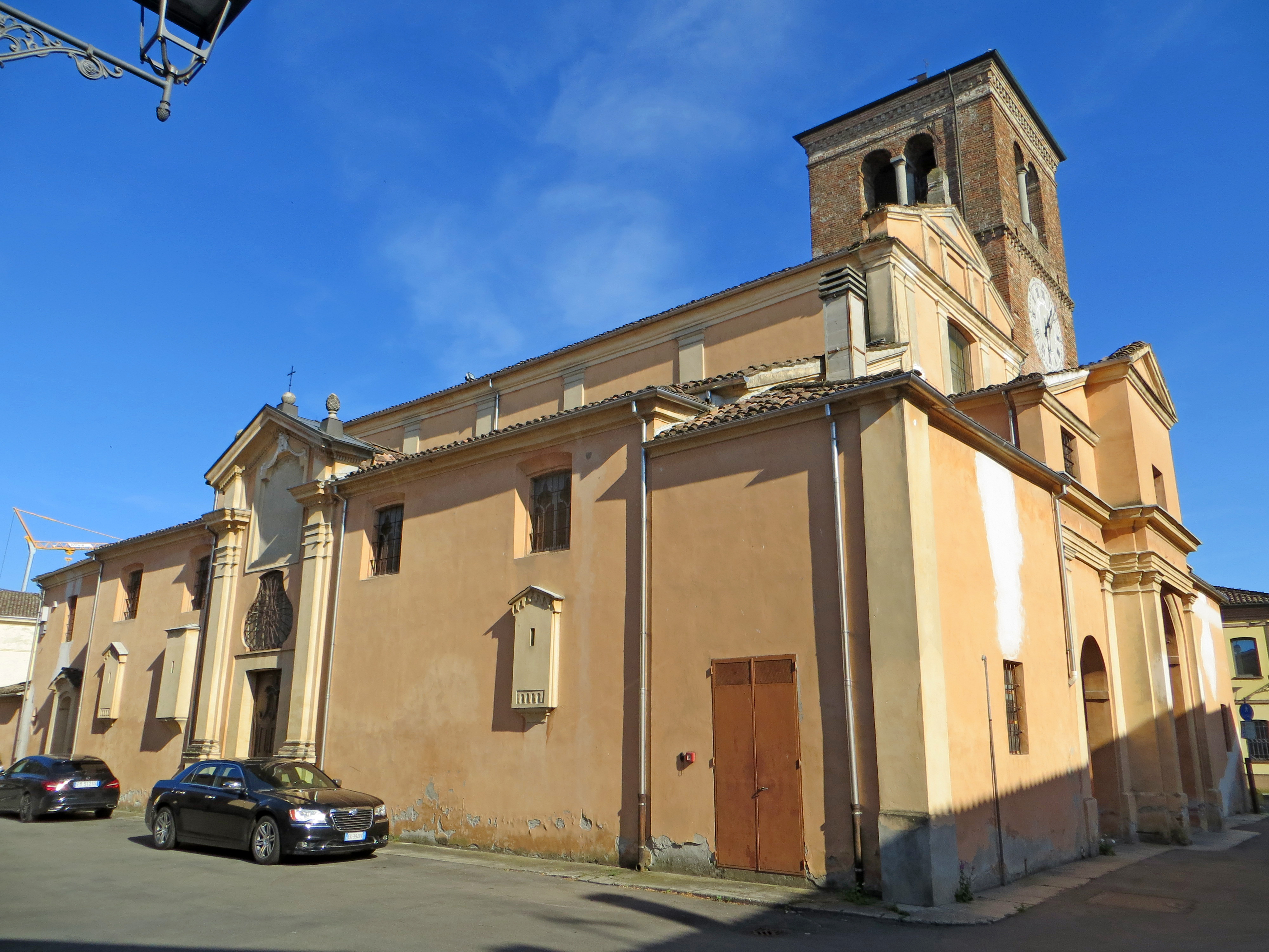 Chiesa di Santa Maria Assunta (Sissa) - facciata e lato nord